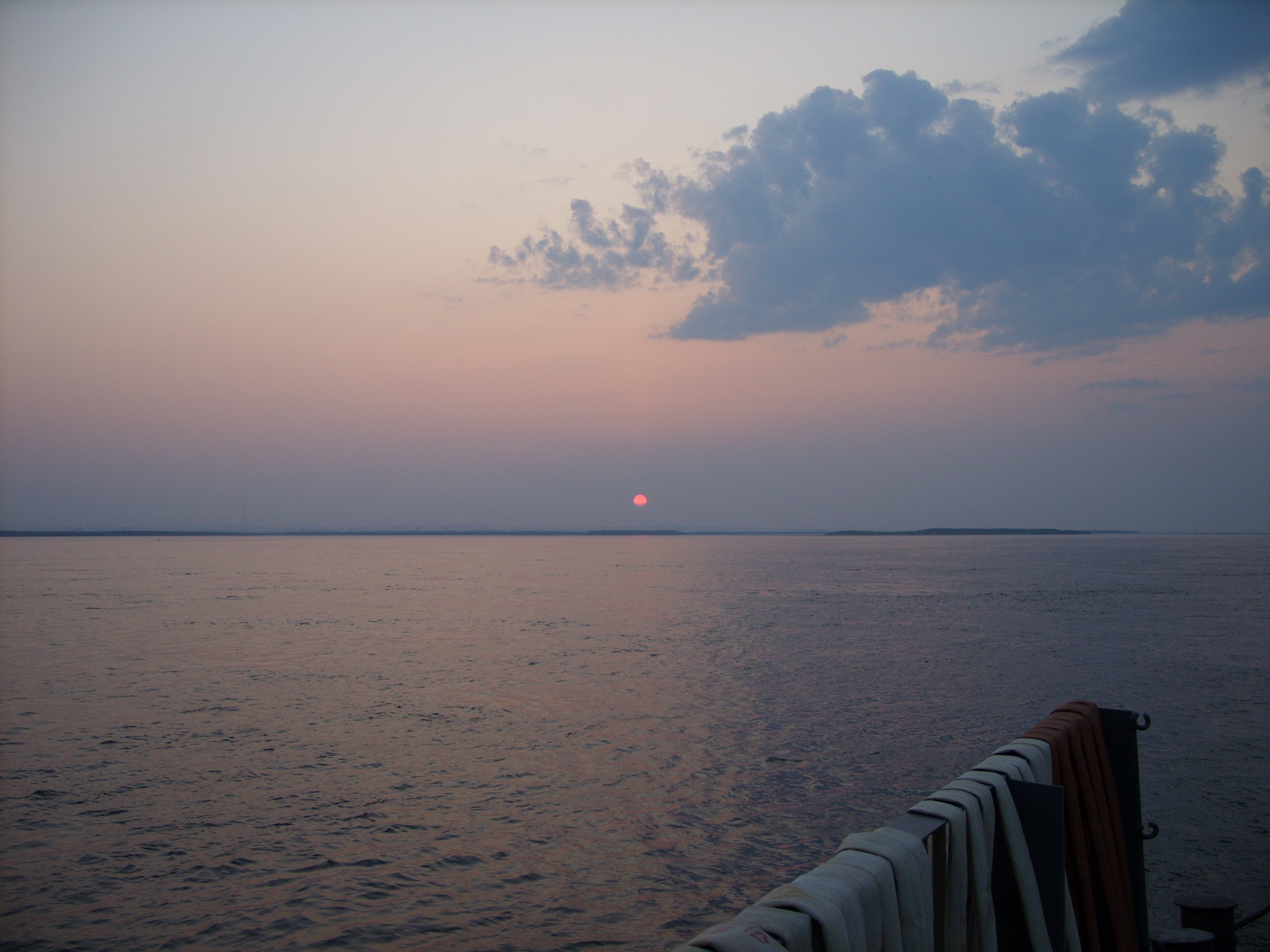 Снимок сделан в Нижнем Бестяхе, с борта парома Якутск - Нижний Бестях